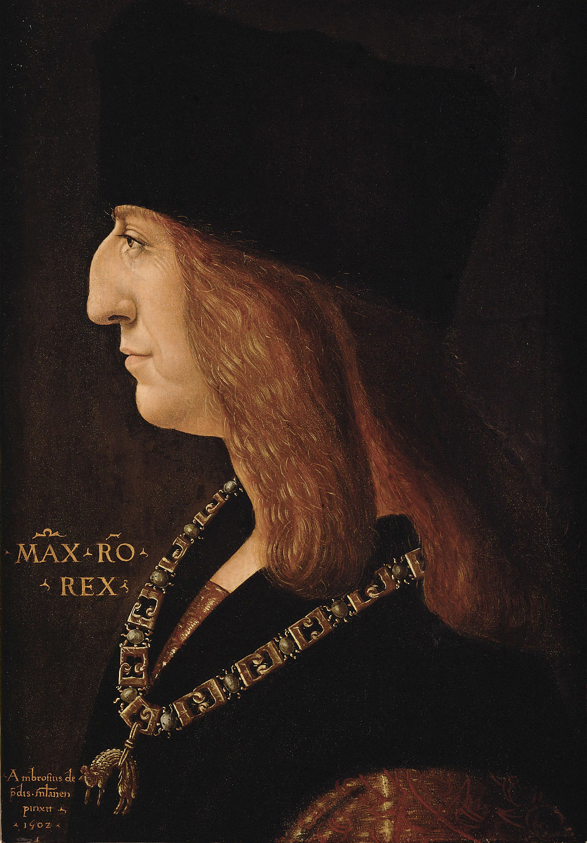 Kaiser Maximilian I. Sohn d. Friedrich III. von Habsburg